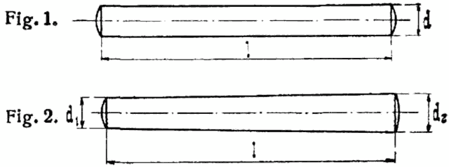 L-Stift